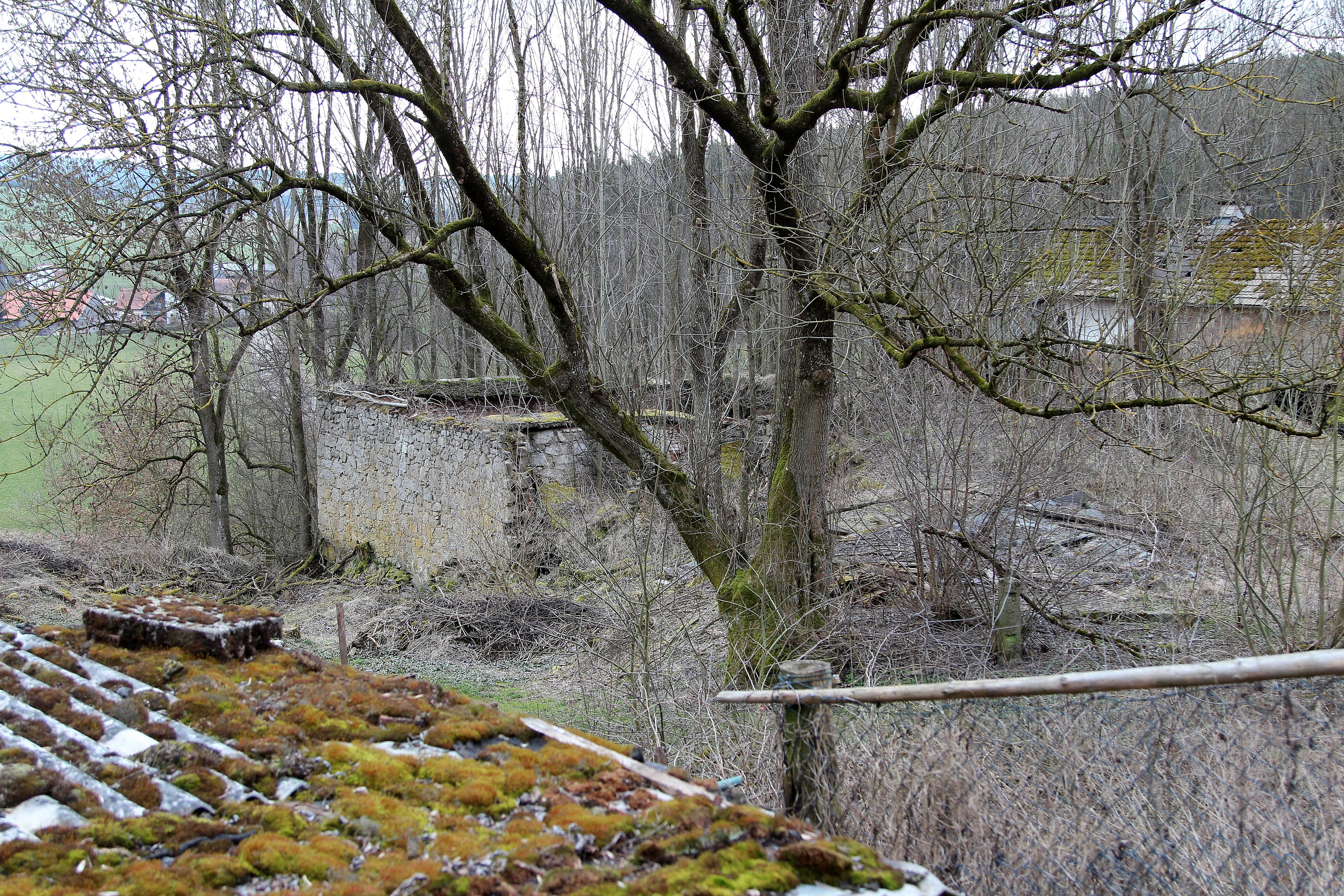 Roggenstein, Mauerreste der Burganlage; Stadt Vohenstrauß, Landkreis Neustadt an der Waldnaab, Oberpfalz, Bayern